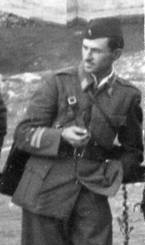 Petar Mećava (Živaja, kod Kostajnice, 22. jun 1914 — Travnik, 22. oktobar 1944), učesnik Narodnooslobodilačke borbe i narodni heroj Jugoslavije.